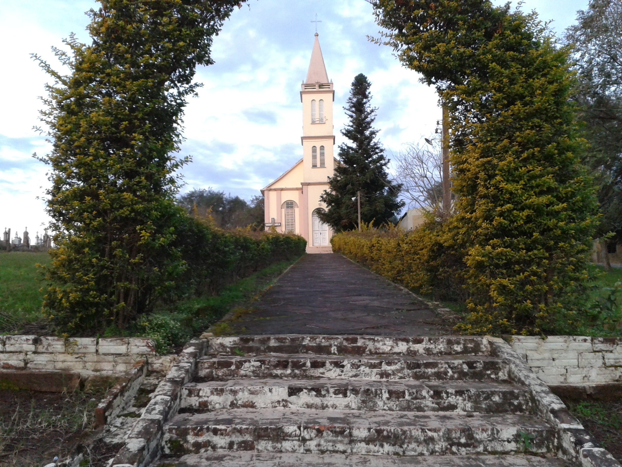 Igreja em Vila Progresso - Vera Cruz RS